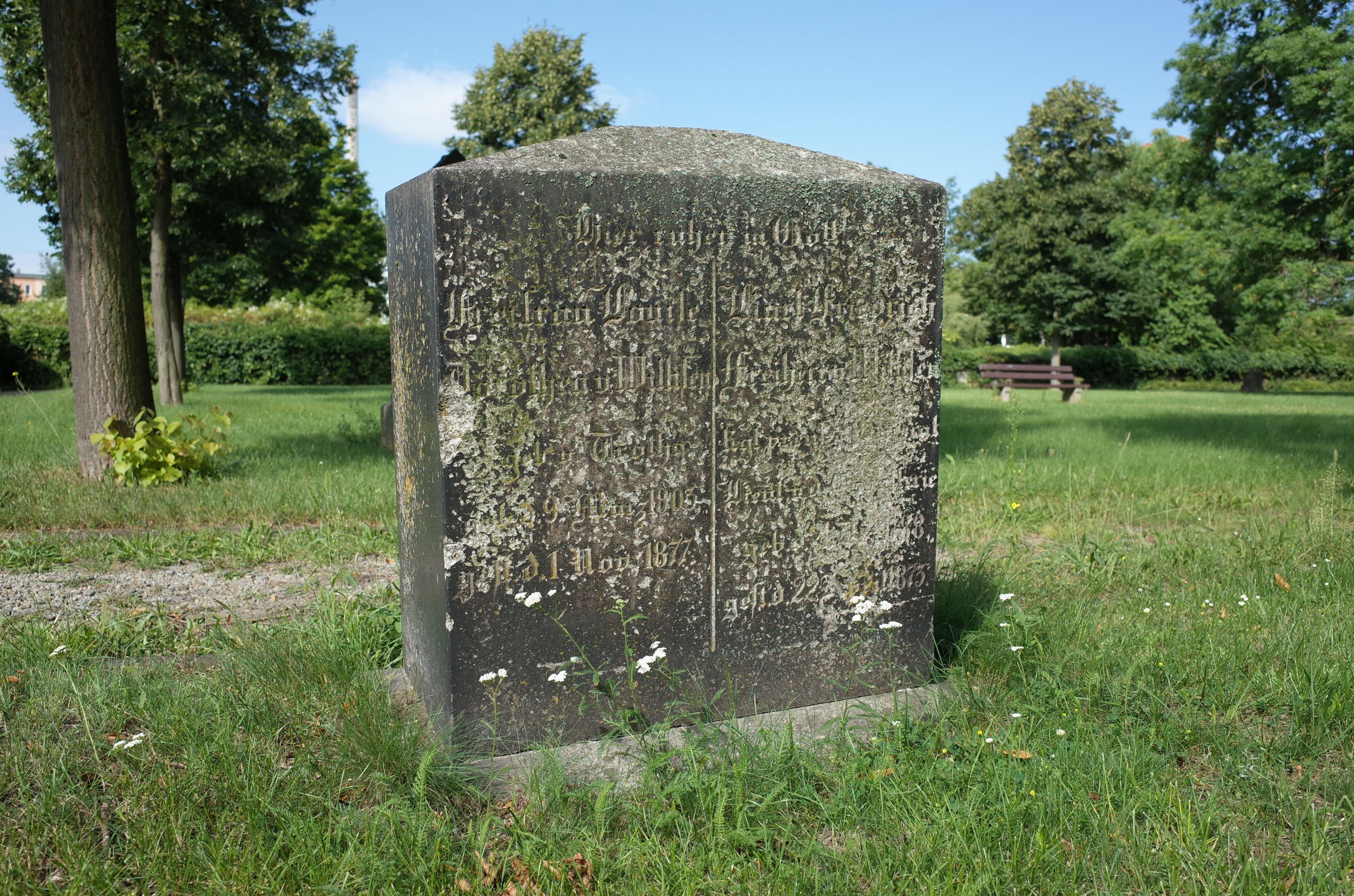 Dessau, Neuer Begräbnisplatz, Grabstein von Karl Friedrich Freiherr von Willisen (21.12.1788 - 22.04.1873) und Freifrau Louise Dorothea von Willisen, geb. von Trotha (9.05.1803 - 1.11.1877). (Quelle: Wo sie ruhen... Berühmte Grabstätten auf historischen Friedhöfen in Deutschland, Webseite der Stiftung Historische Kirchhöfe und Friedhöfe in Berlin-Brandenburg [1])